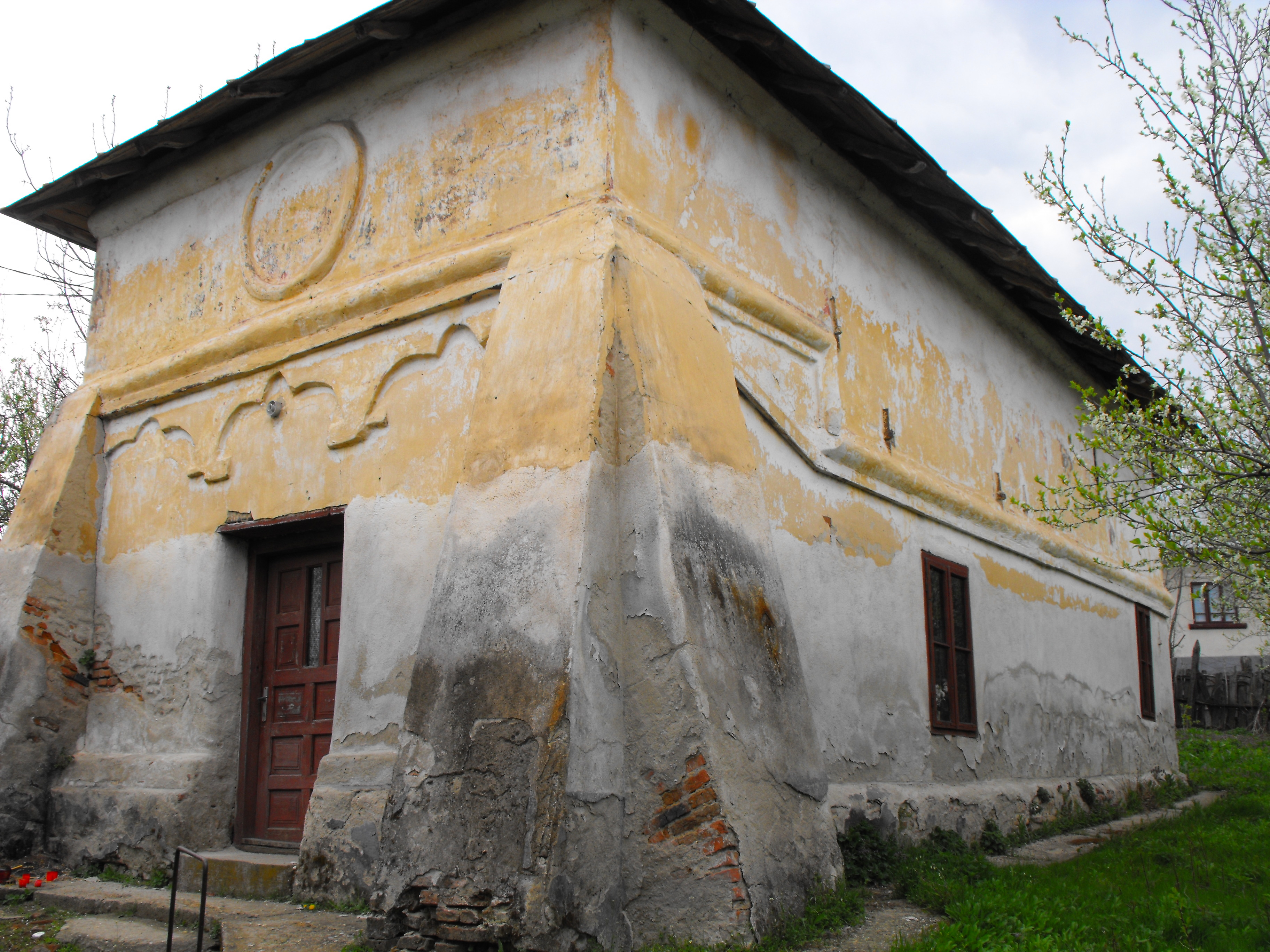 Biserica "Adormirea Maicii Domnului"